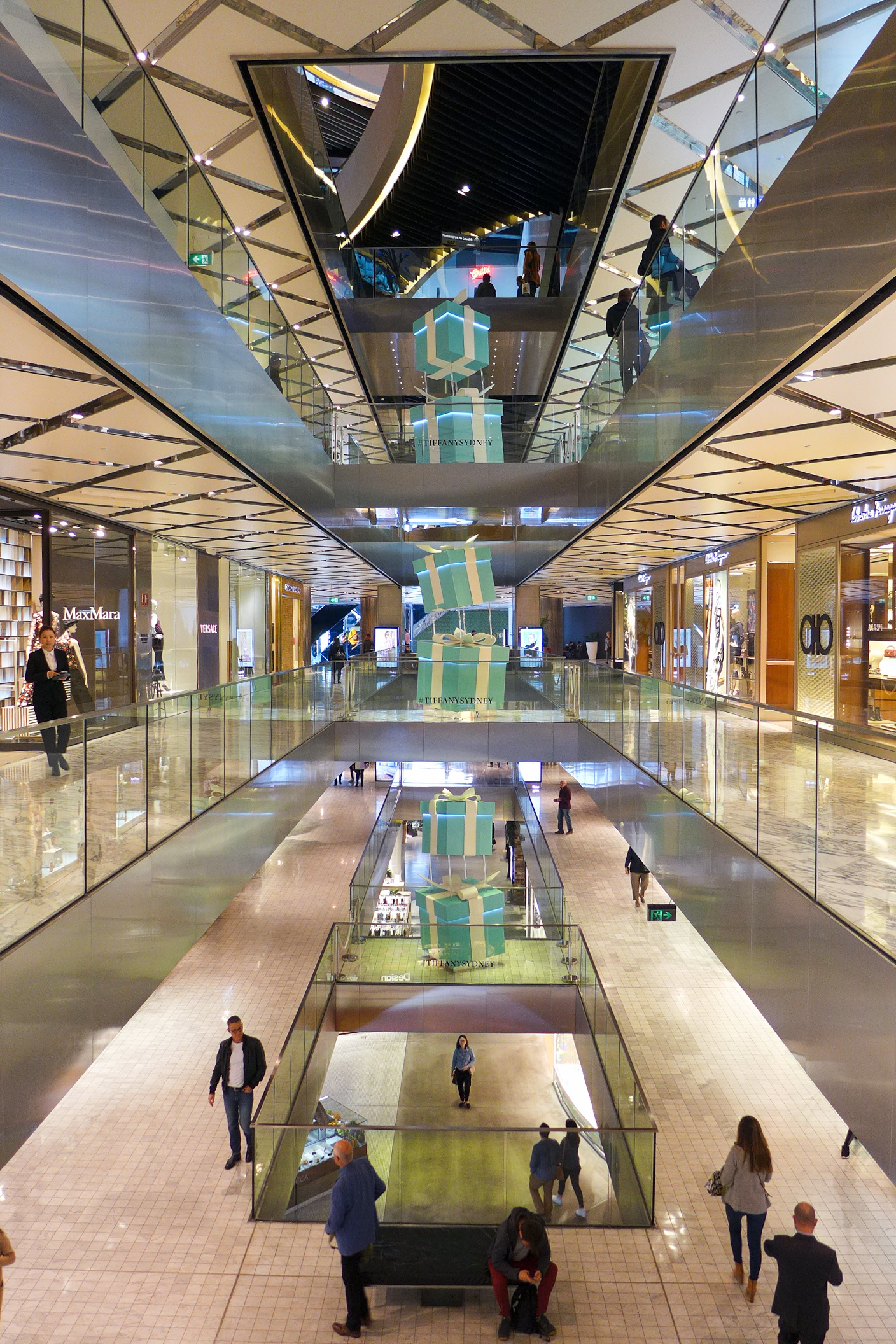 Westfield Sydney Void